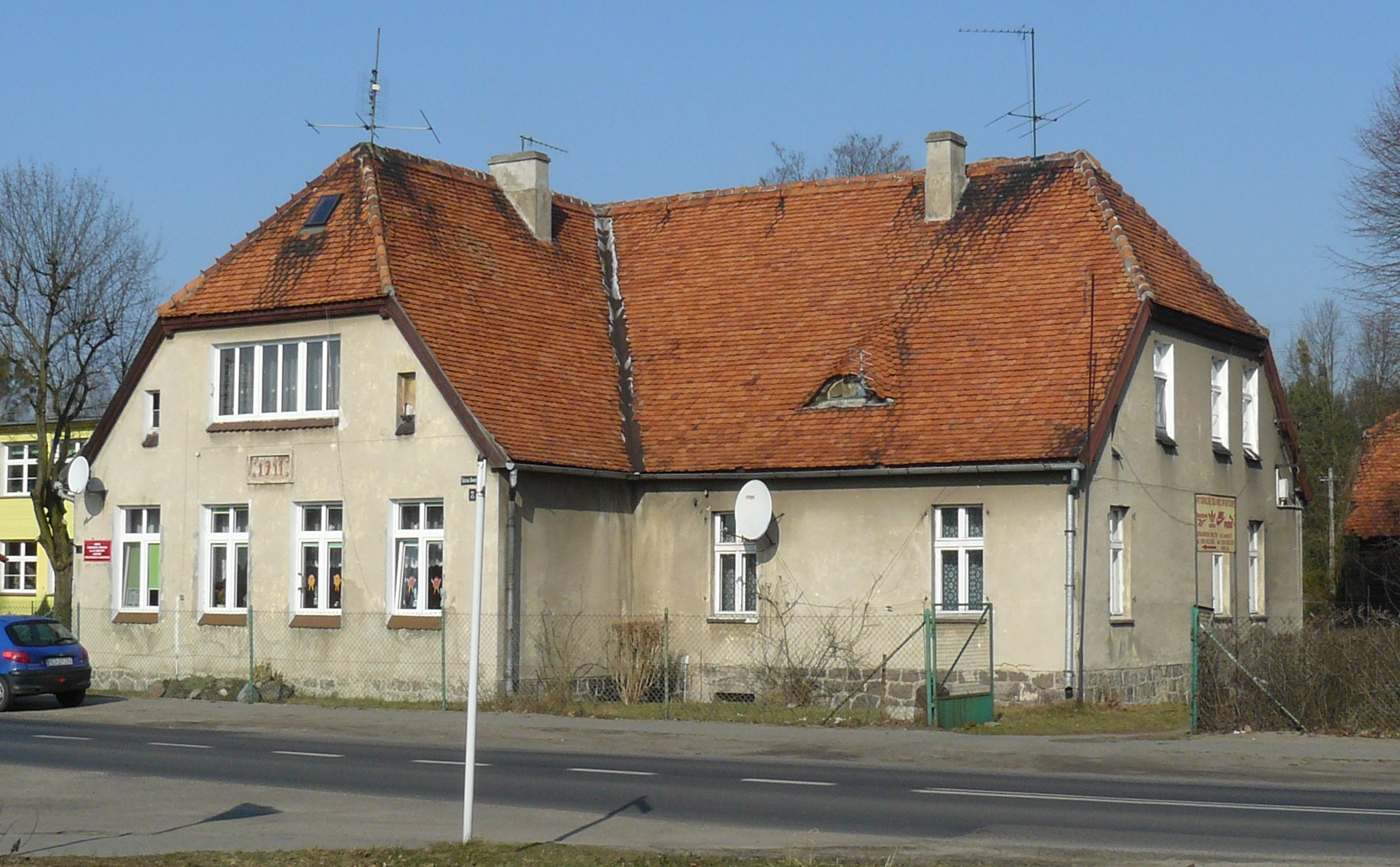 Drawski Młyn. Stara szkoła (obecn. przedszkole).